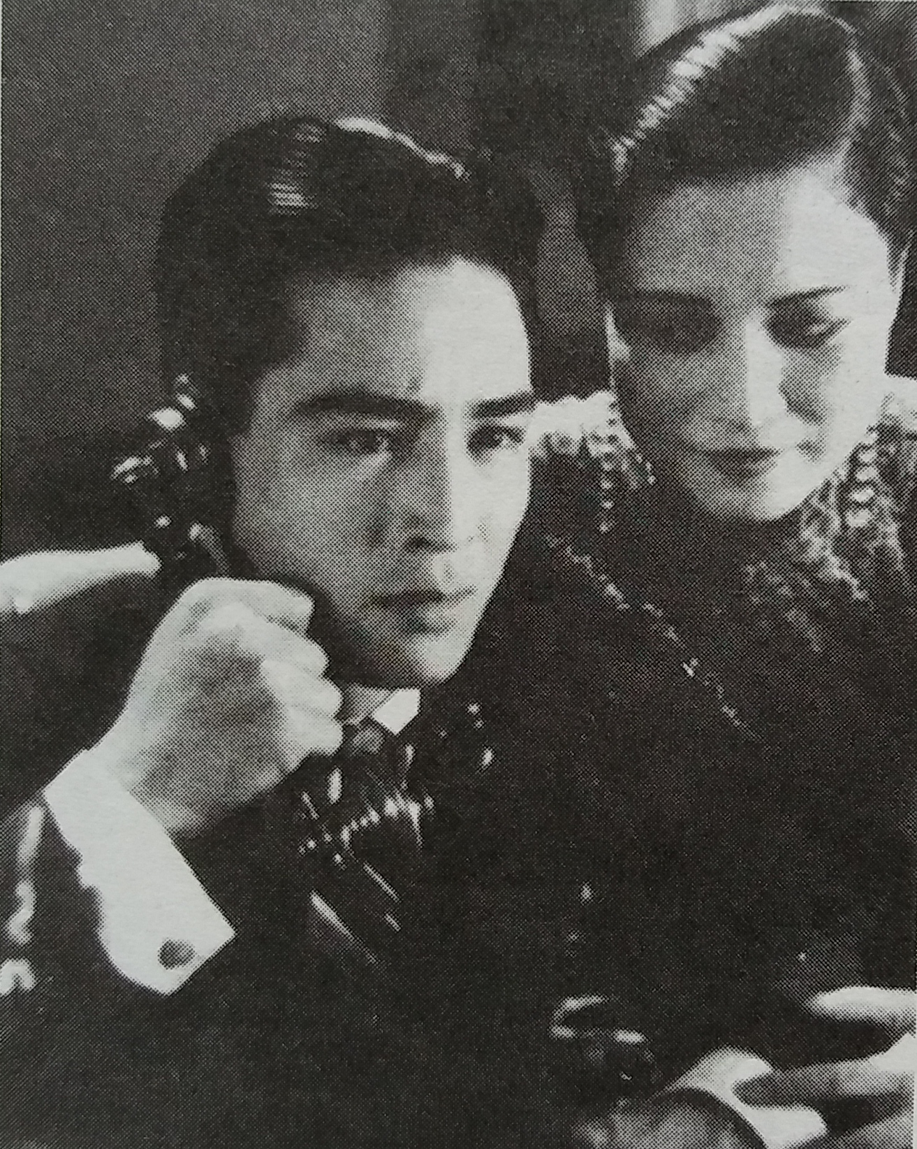 三个摩登女郎剧照